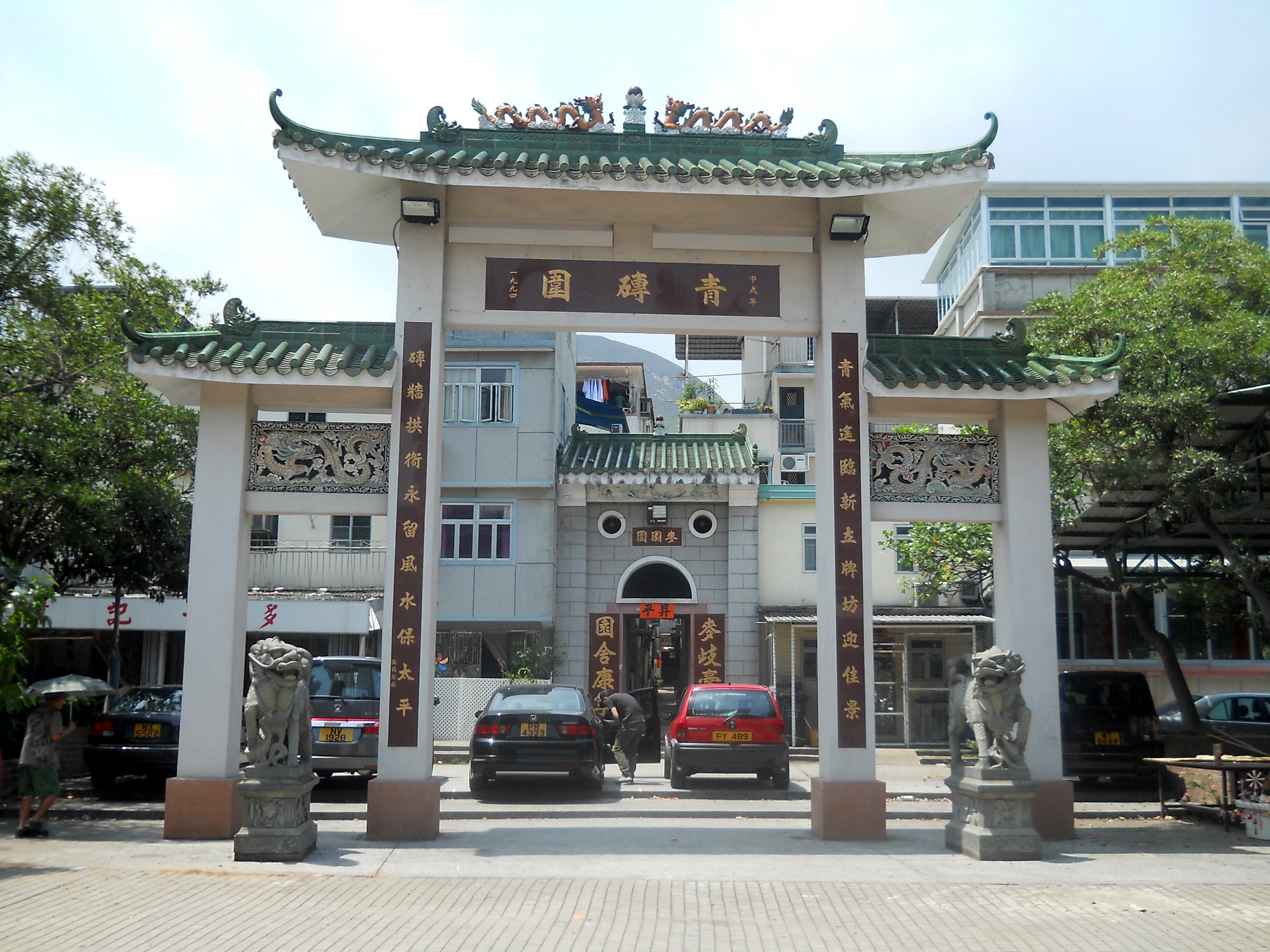 中文（香港）: 藍地青磚圍